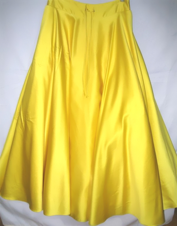 Long shiny evening skirt